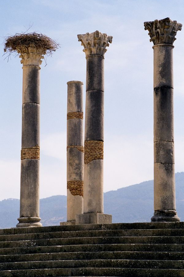 Volubilis